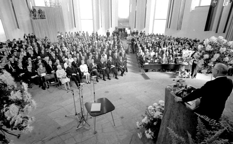 Verleihung des Friedenspreis des Börsenvereins des Deutschen Buchhandels an Gunnar und Alva Myrdal (Schweden) in Anwesenheit von Bundespräsident Heinemann in der Frankfurter Paulskirche